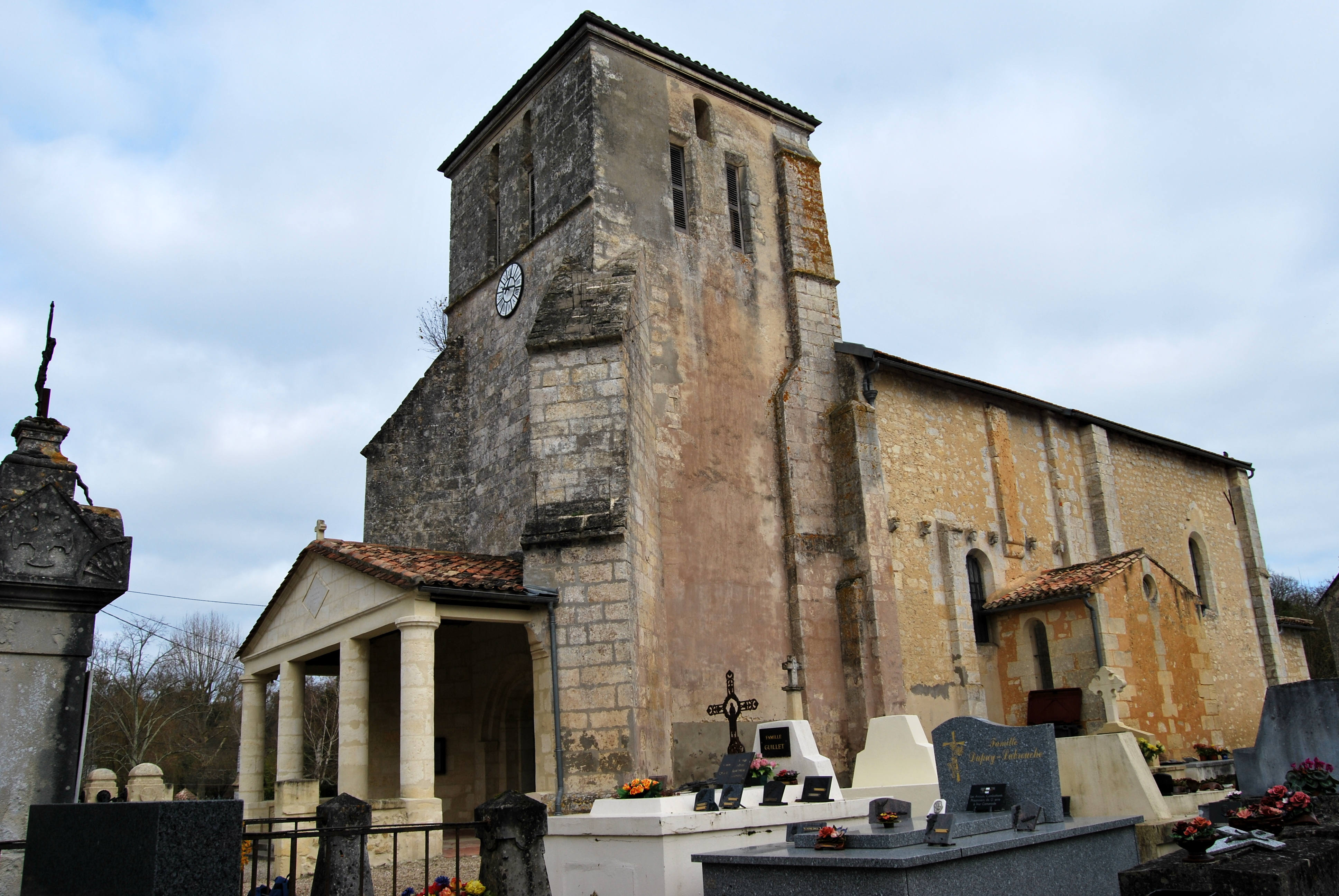 Église Saint-Martin de Bonnetan